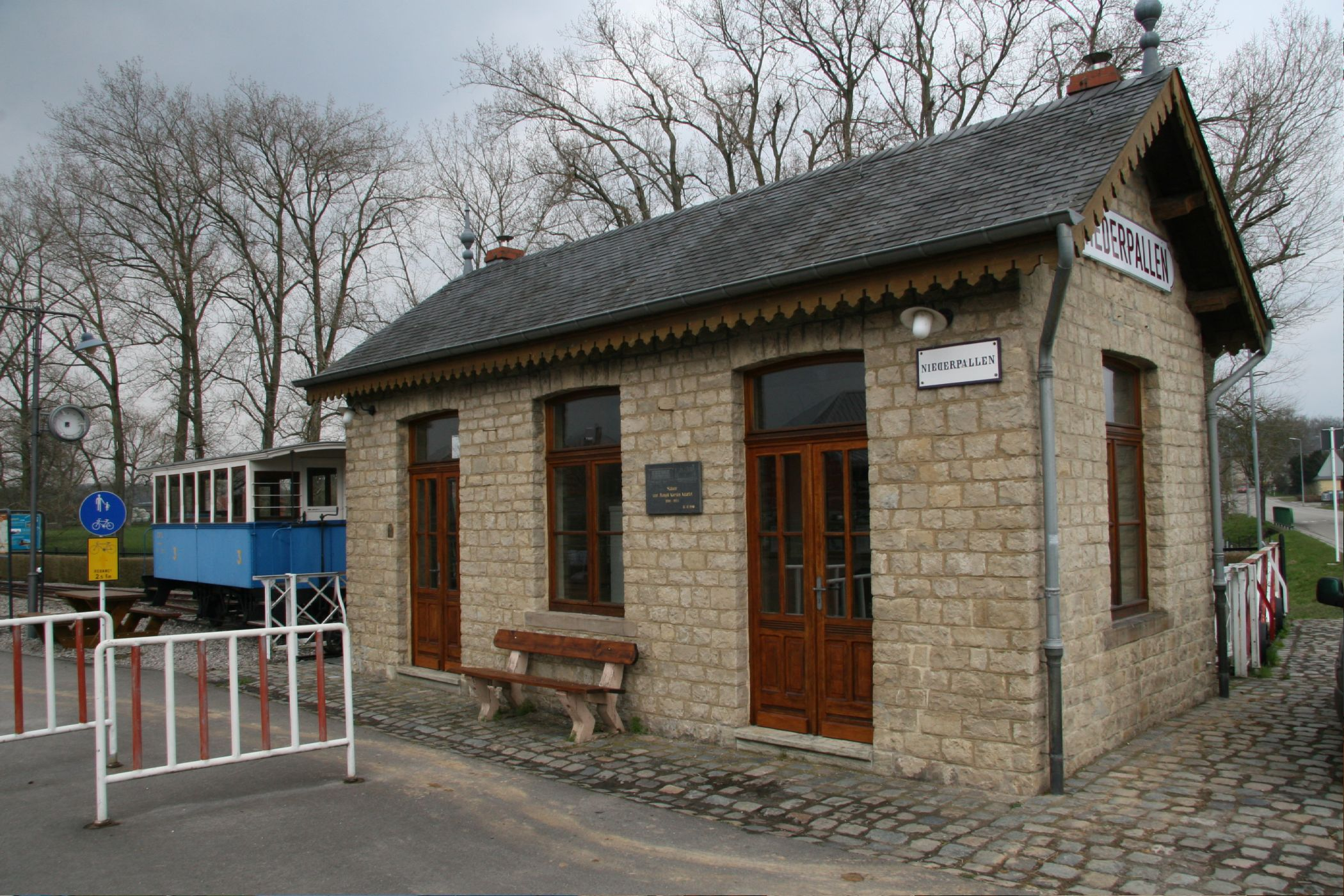 Déi fréier Gare zu Nidderpallen bäi der Vëlospist.